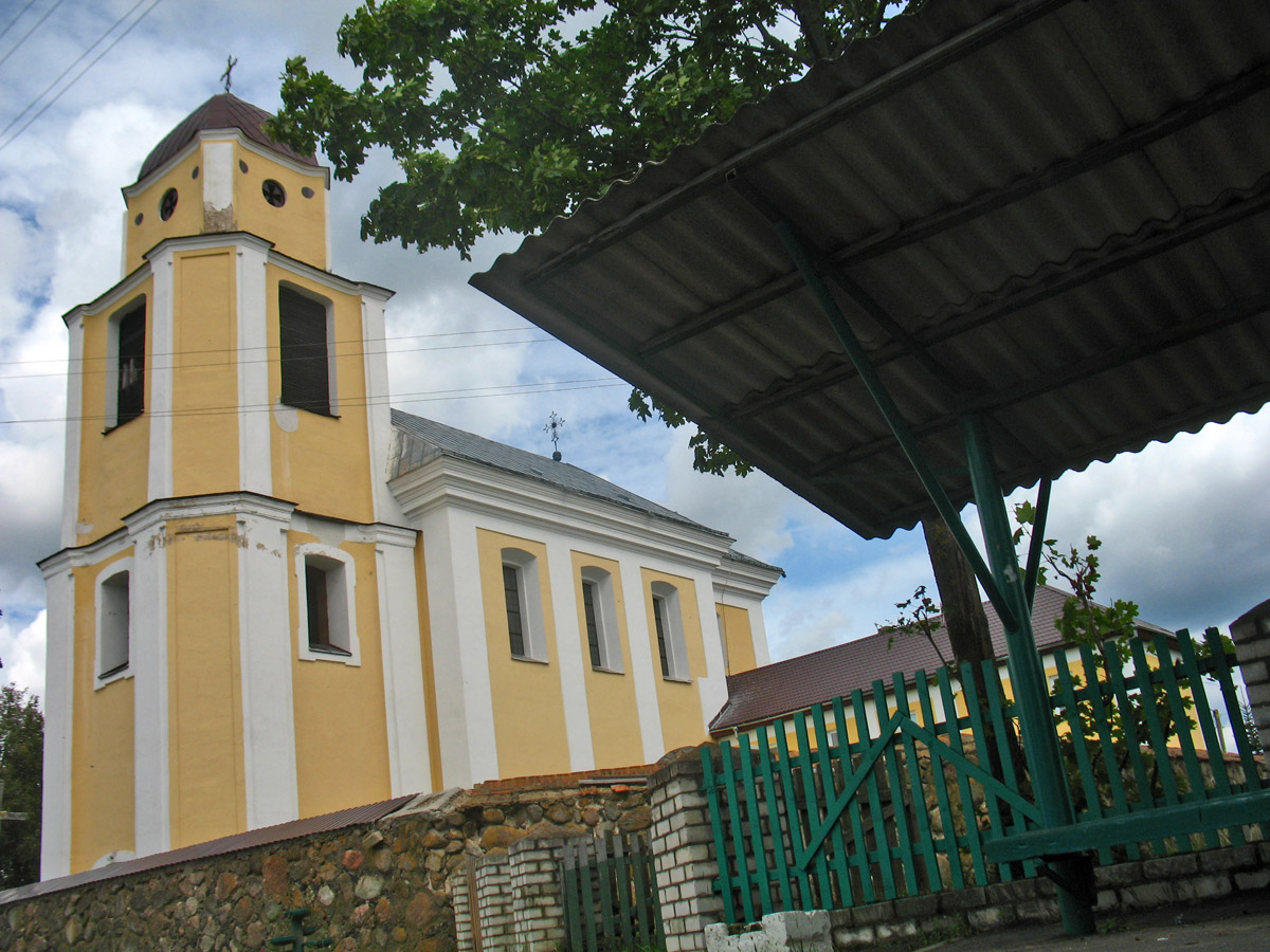 Беларуская (тарашкевіца): Крывічы (Kryvičy)